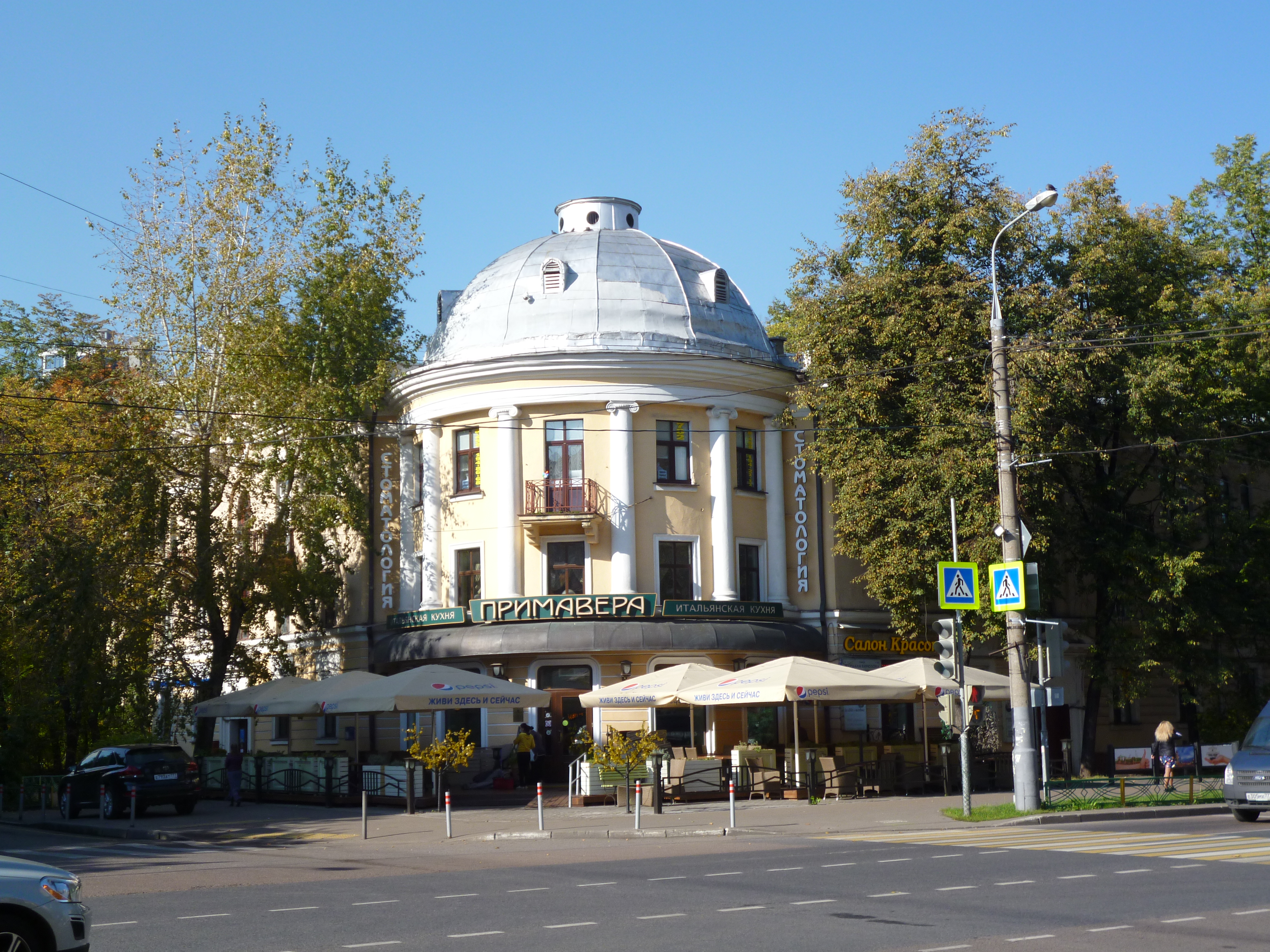 Жилые дома: Бирюзова Маршала ул., дом 21, Щукино, Северо-западный округ, Москва